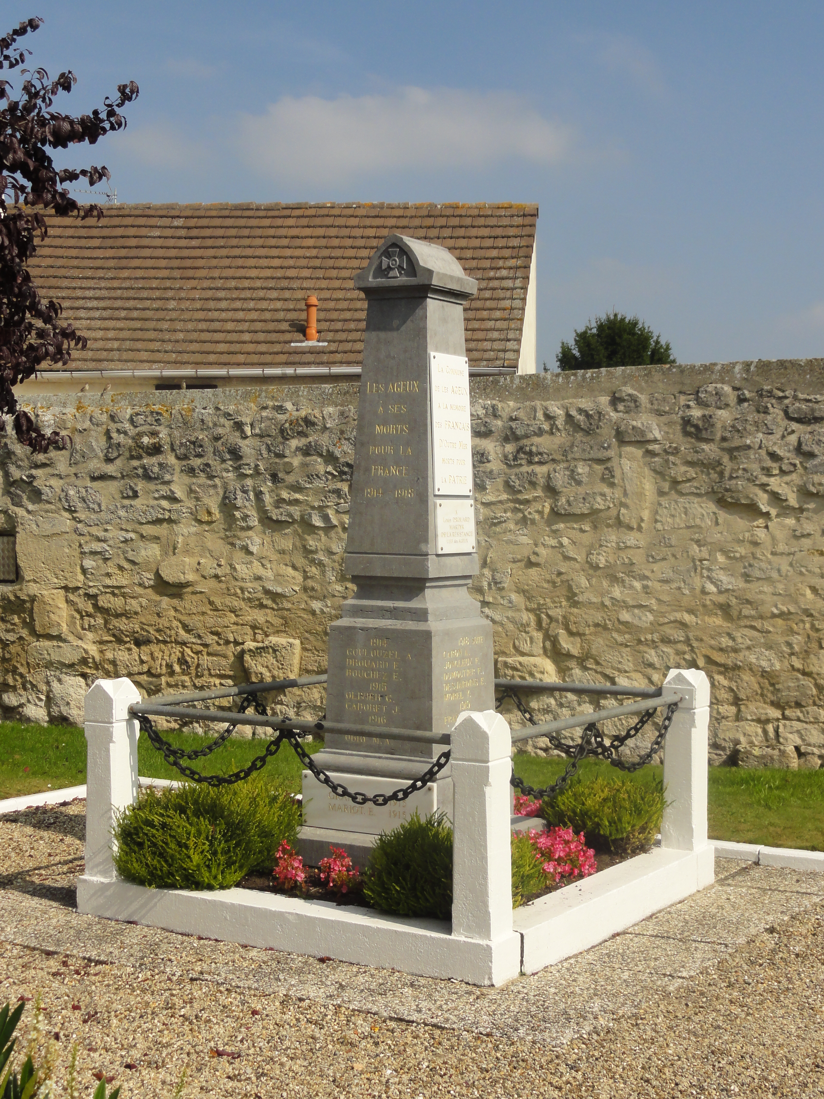 Monument aux morts, place Charles-Dupuis.